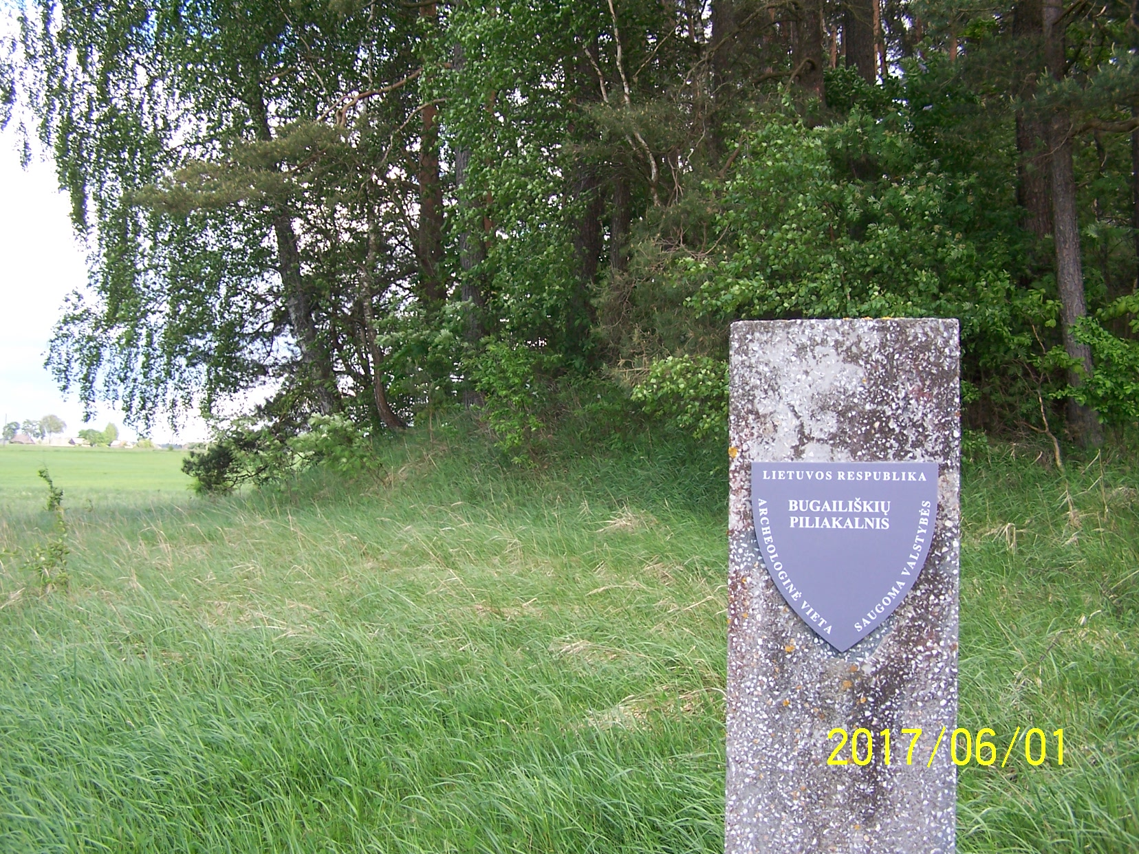 Bugailiškių piliakalnis